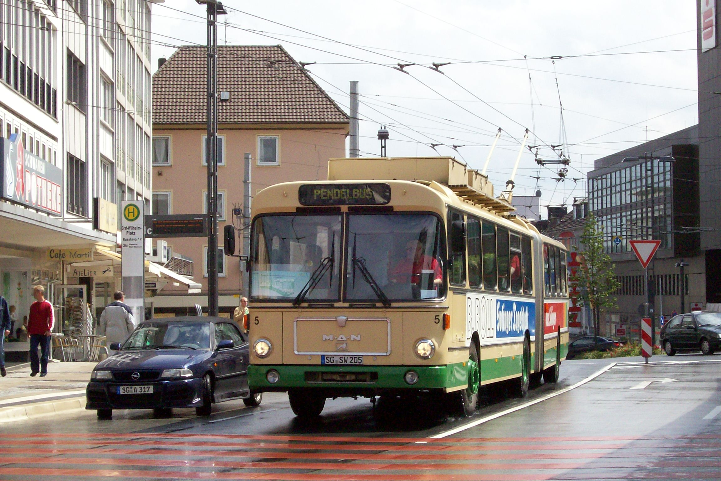 Stadtwerke Solingen, Wagen 5. Einzig verbliebener MAN SG 200 HO in Solingen am Graf-Wilhelm-Platz. Das Fahrzeug ist heute Eigentum des Obus-Museum Solingen e.V.